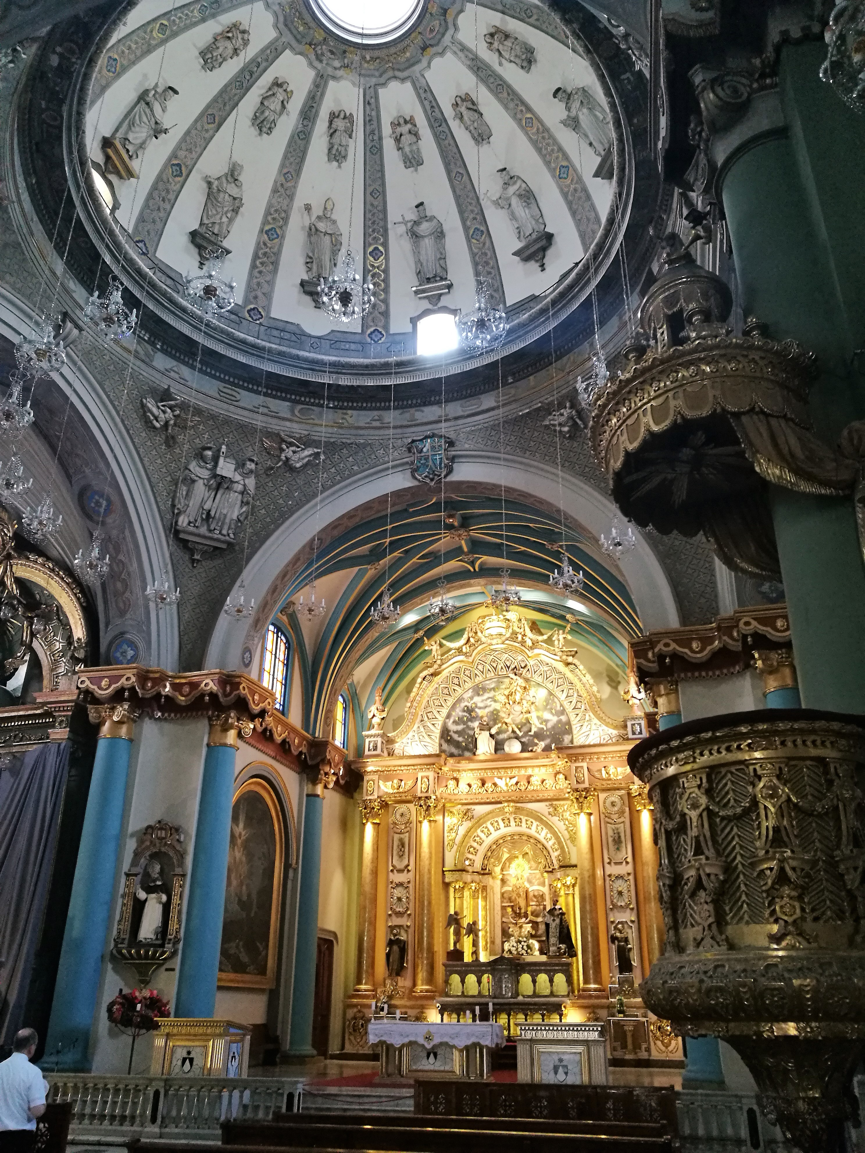 Altar i àbsis de l'església de Santo Domingo, al Cercado de Lima